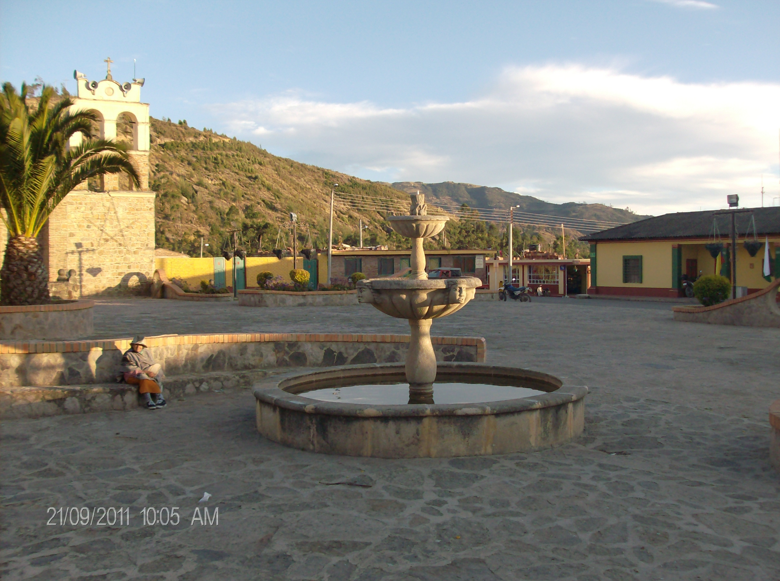 Pila situada en el parque central del municipio.